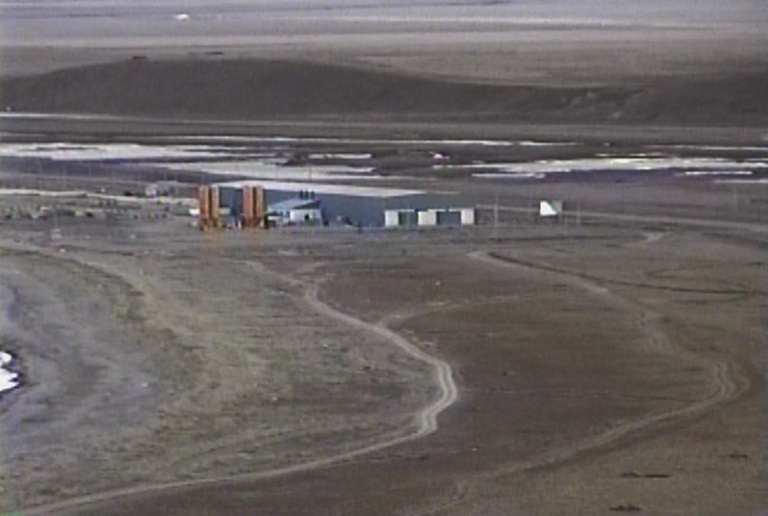 Puerto Caleta la Misión, a unos 12 kilómetros al norte de la ciudad de Río Grande, Provincia de Tierra del Fuego, Antártida e Islas del Atlántico Sur, Argentina.